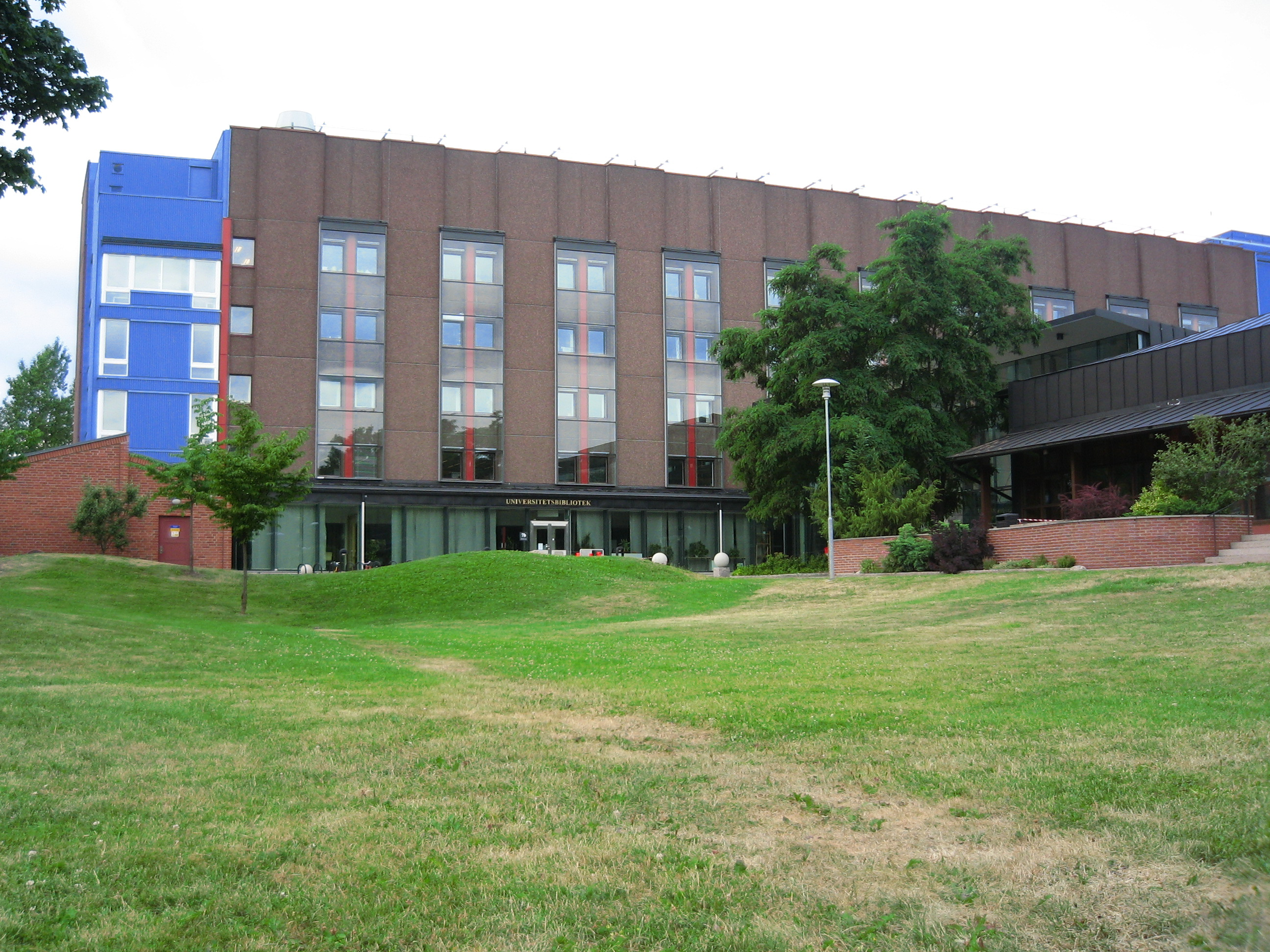 Universitetsbiblioteket och Berzeliuslaboratoriet, KI Solna